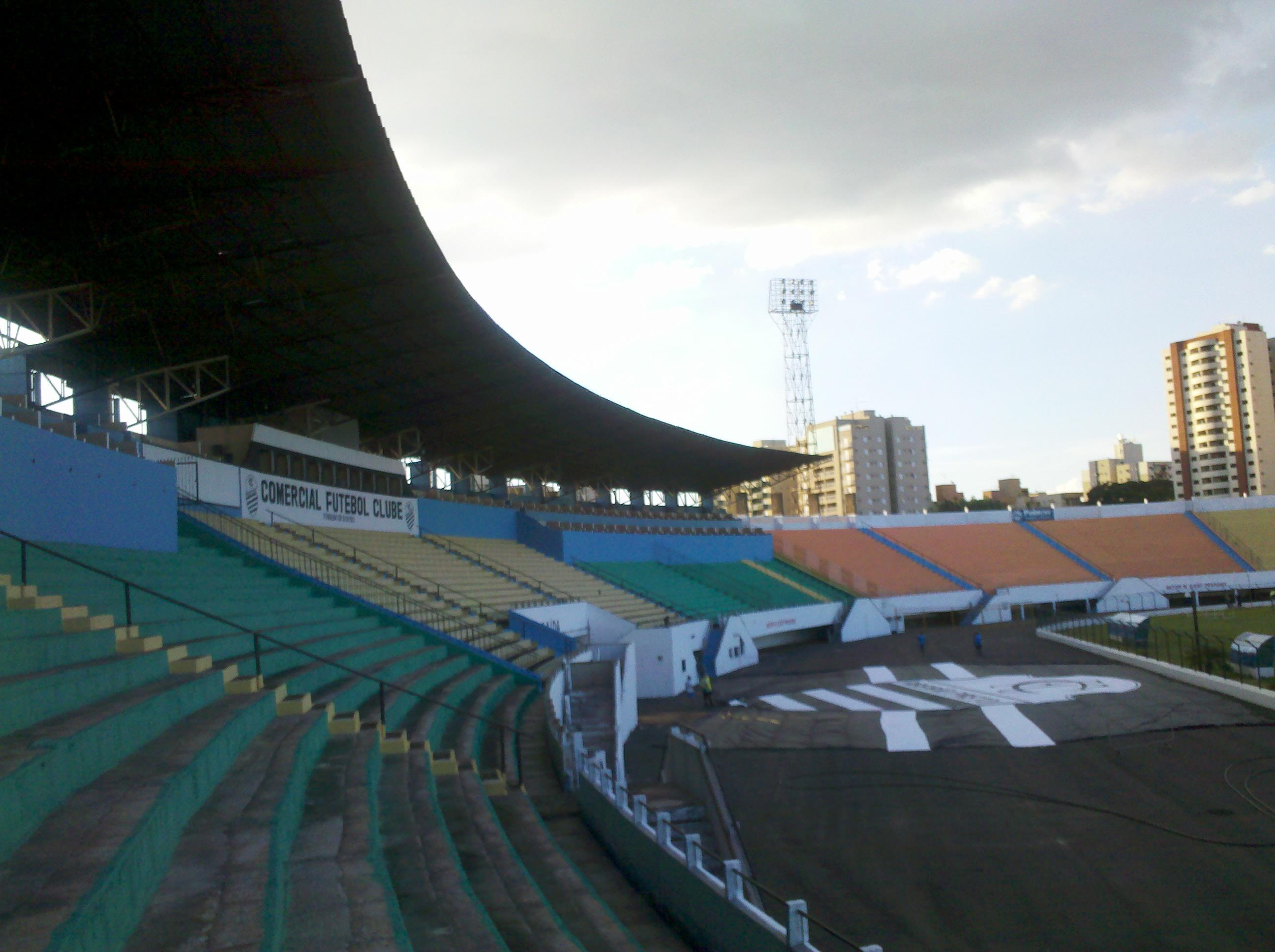 Panorâmica das sociais